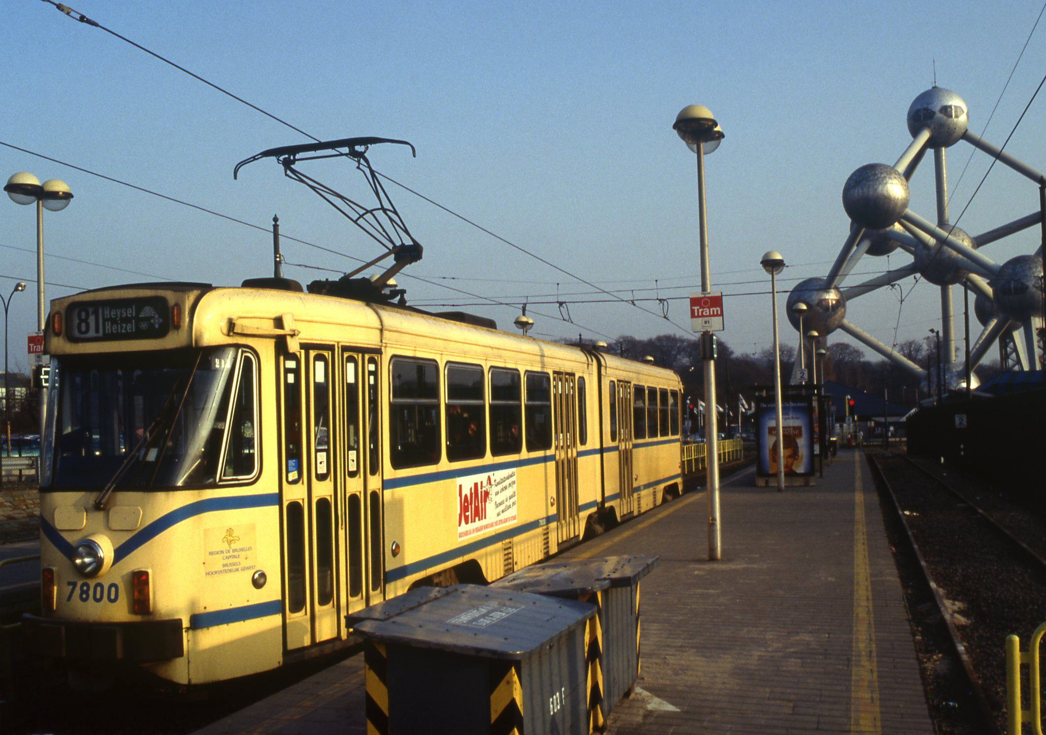 Tram 81 bij zijn eindpunt in Heizel